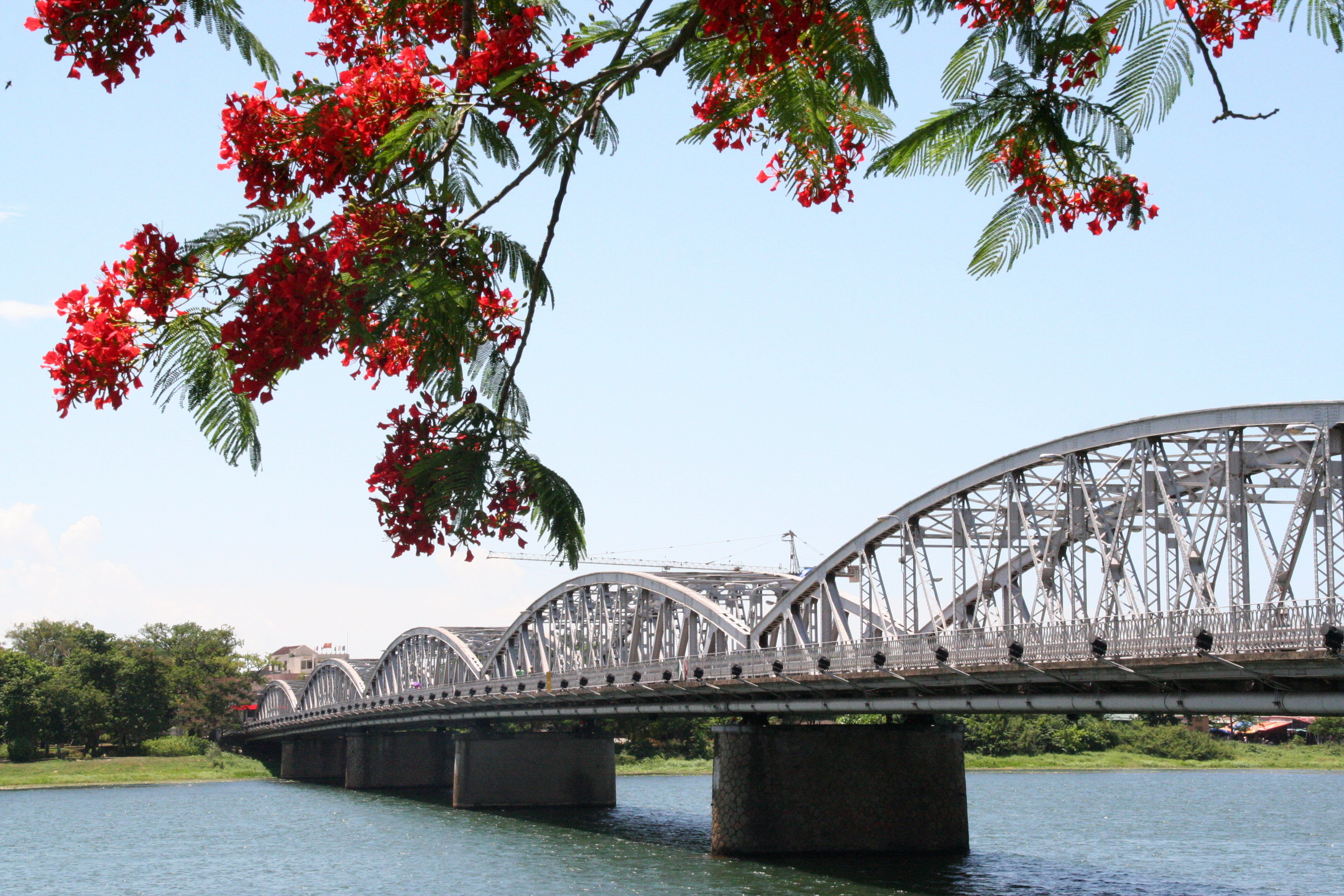 Hué, le pont Trang Tien, ancien pont Clemenceau